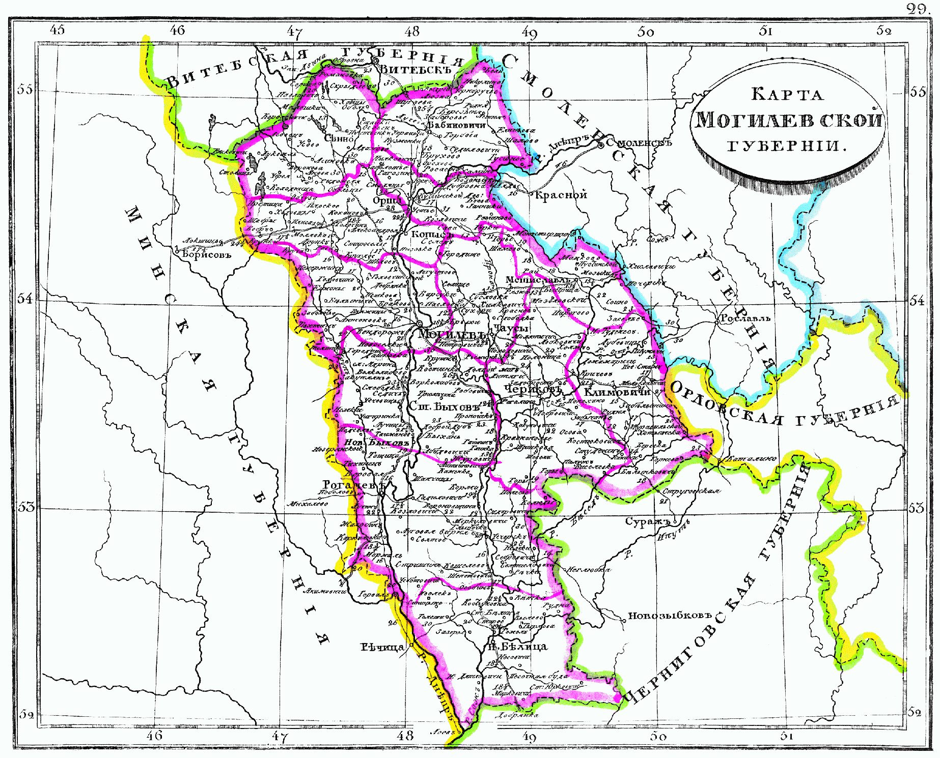 Карта Могилёвской губернии, 1835